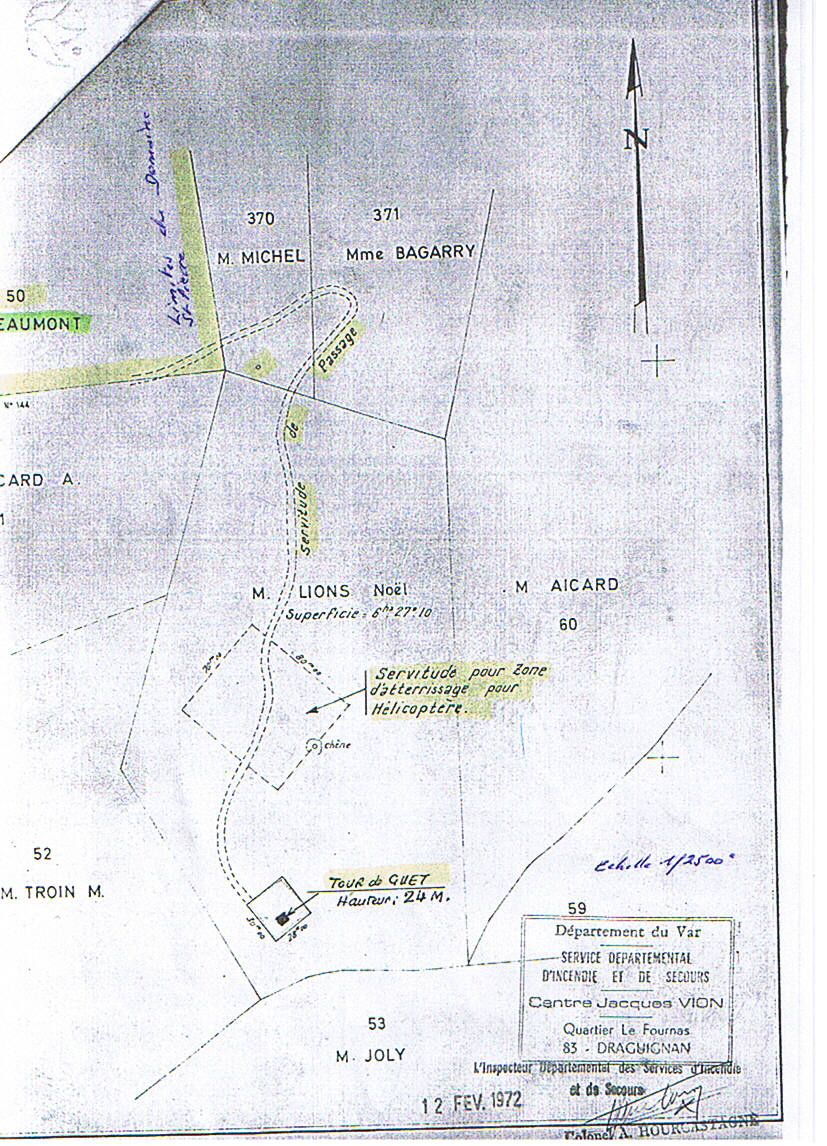 Ampus, Domaine Saint Pierre, protection incendie du Service départemental d'incendie et de secours (SDIS) du Var : Accès à la Tour de guet, servitudes de passage et de zone d'atterrissage d'hélicoptère